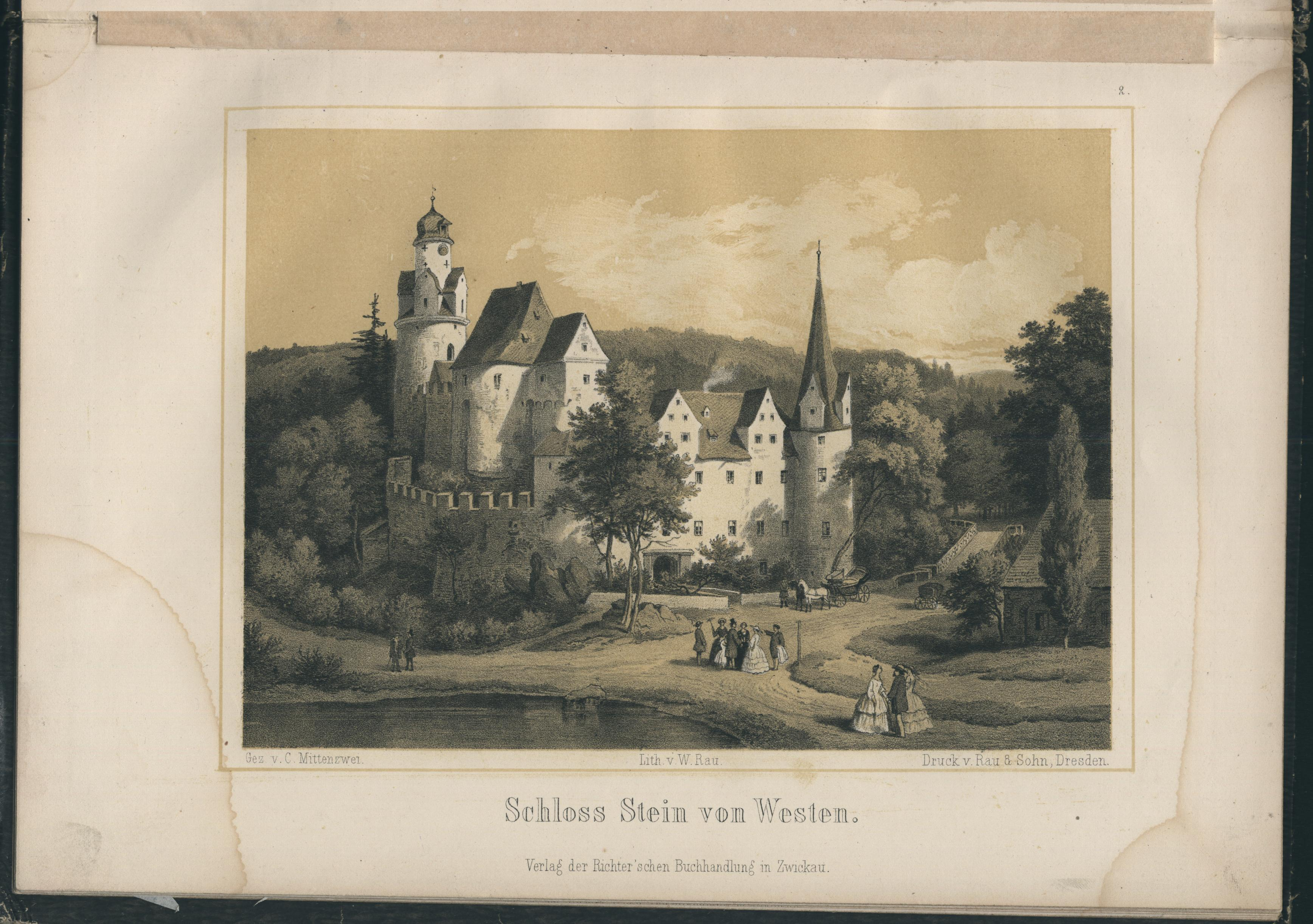 Seite aus: Album der Obererzgebirgischen Staats-Eisenbahn